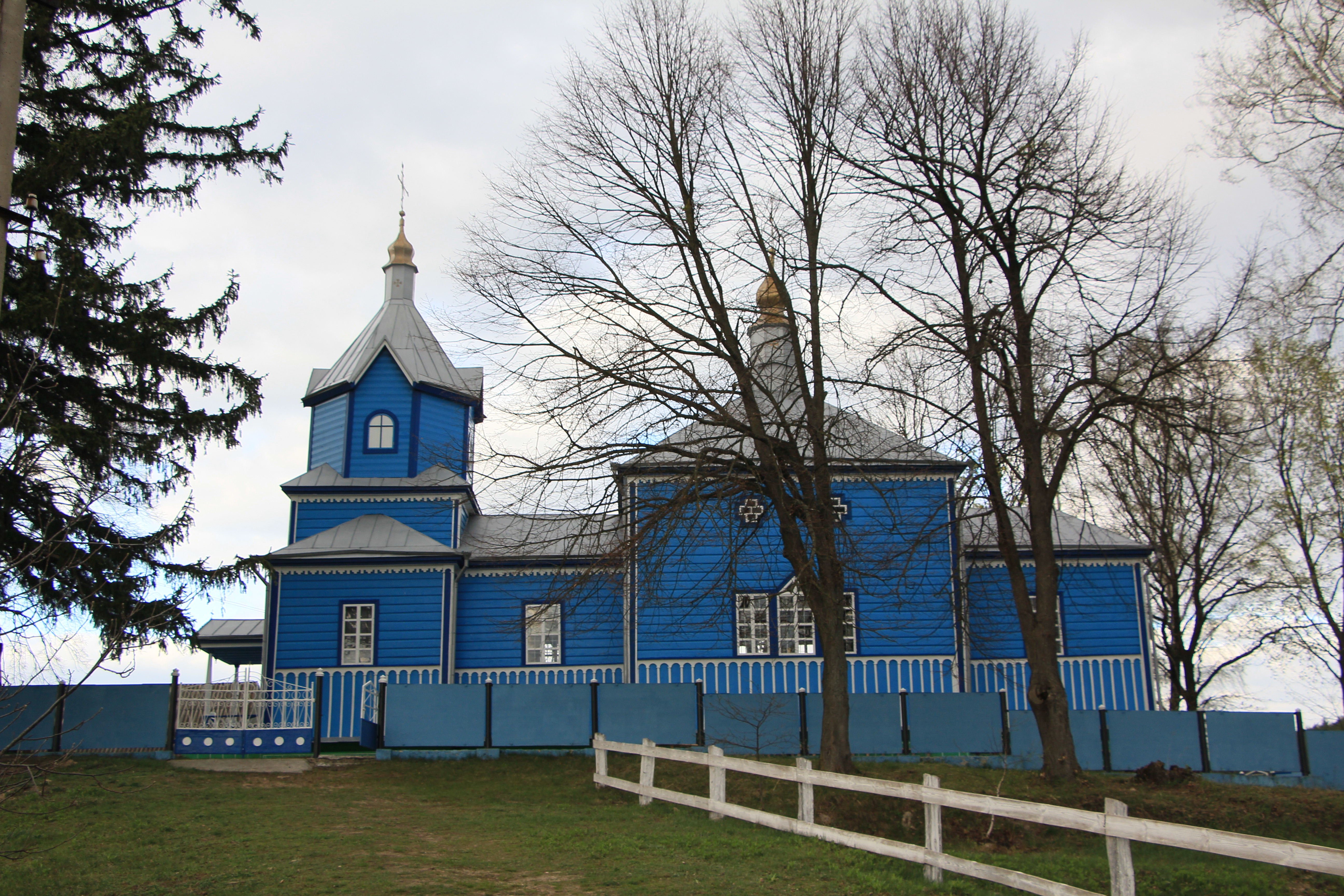 Дерев'яна церква в селі Переморівка Шумського району Тернопільської області